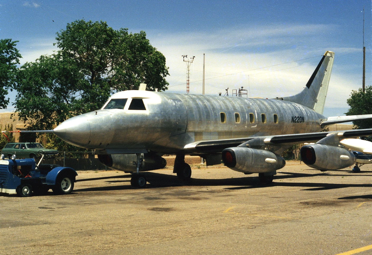 McDonnell 220, Westernair, N220N, Albuquerque